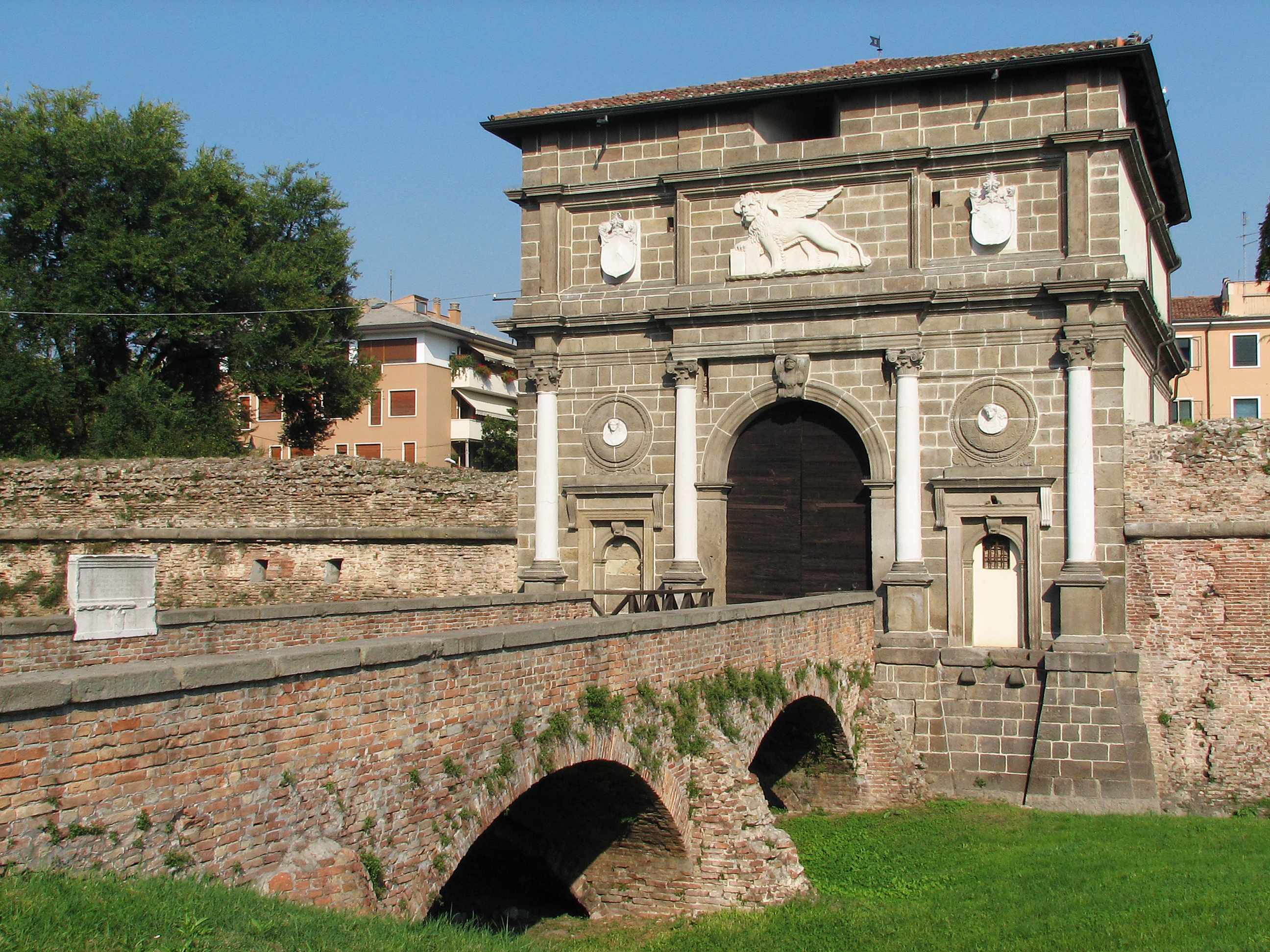 Padova: Porta Savonarola.